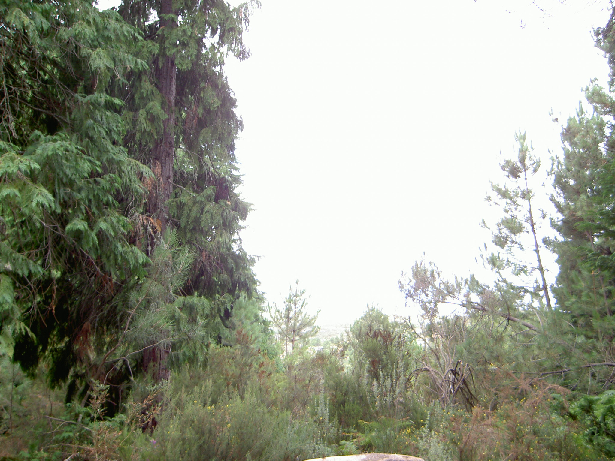 pinhal